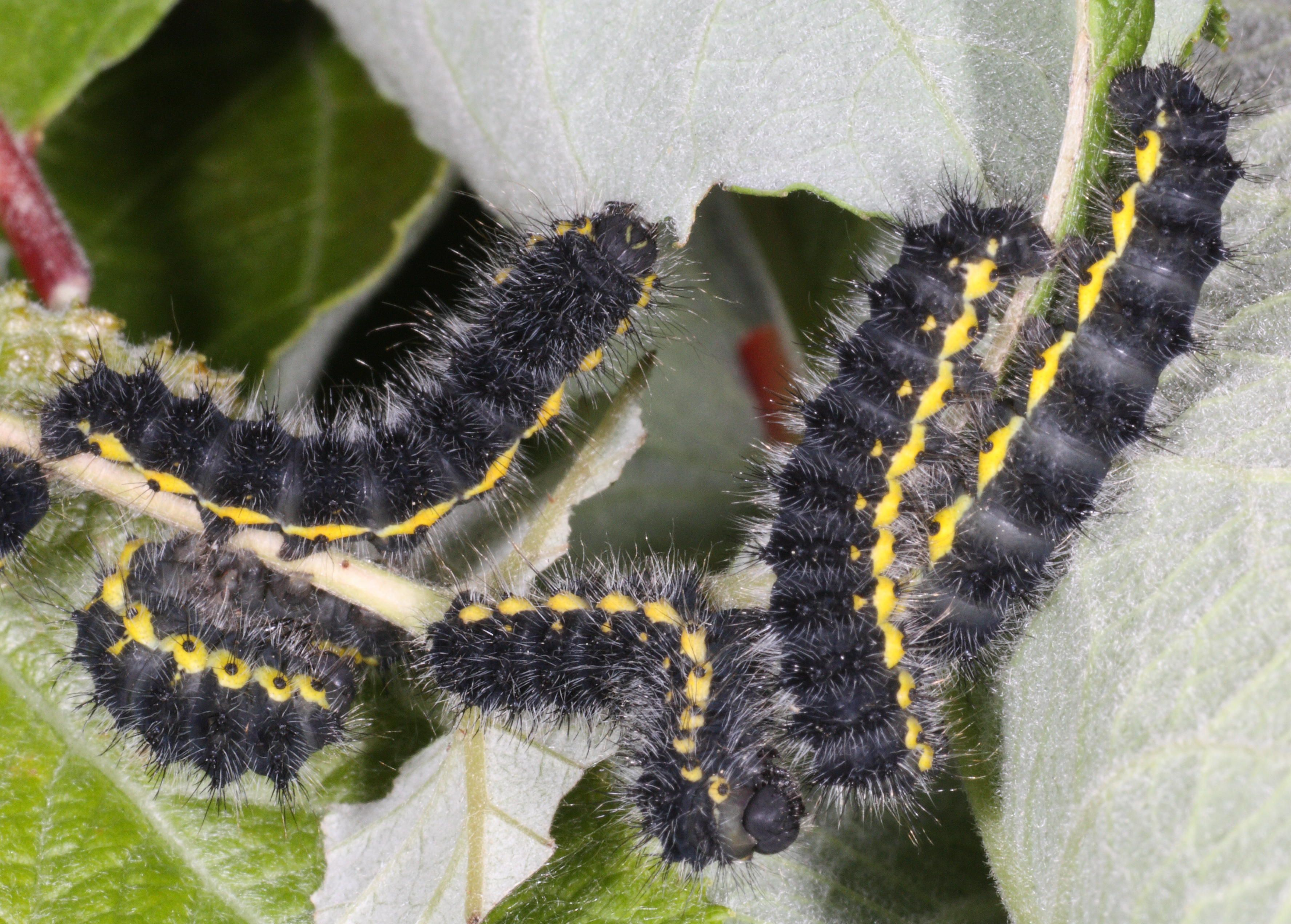 Larver av nattpåfugløye Saturnia pavonia har mørk farge når de er unge. Template:Byline